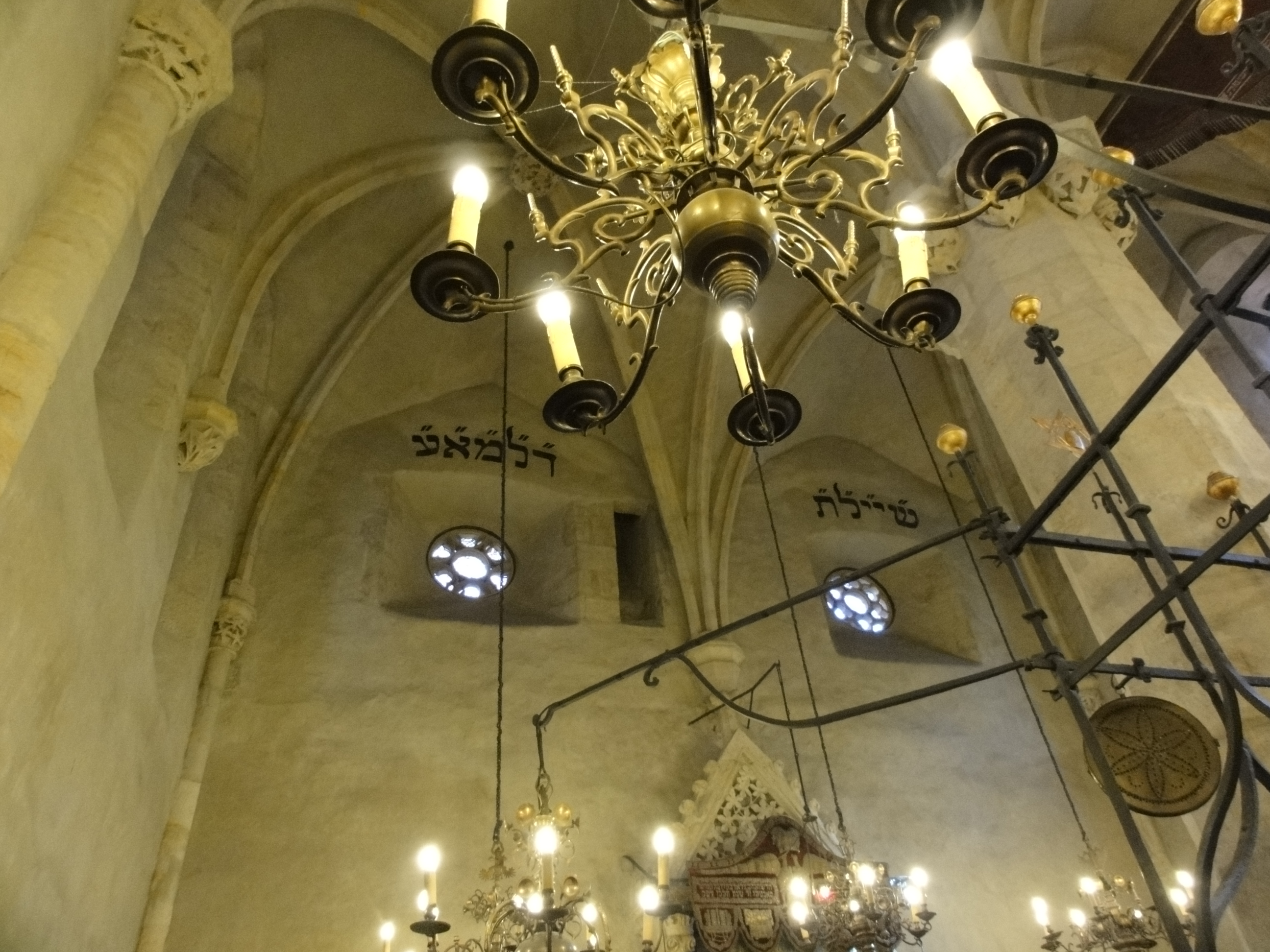 שויתי יי לנגדי תמיד דע לפני מי אתה עומד